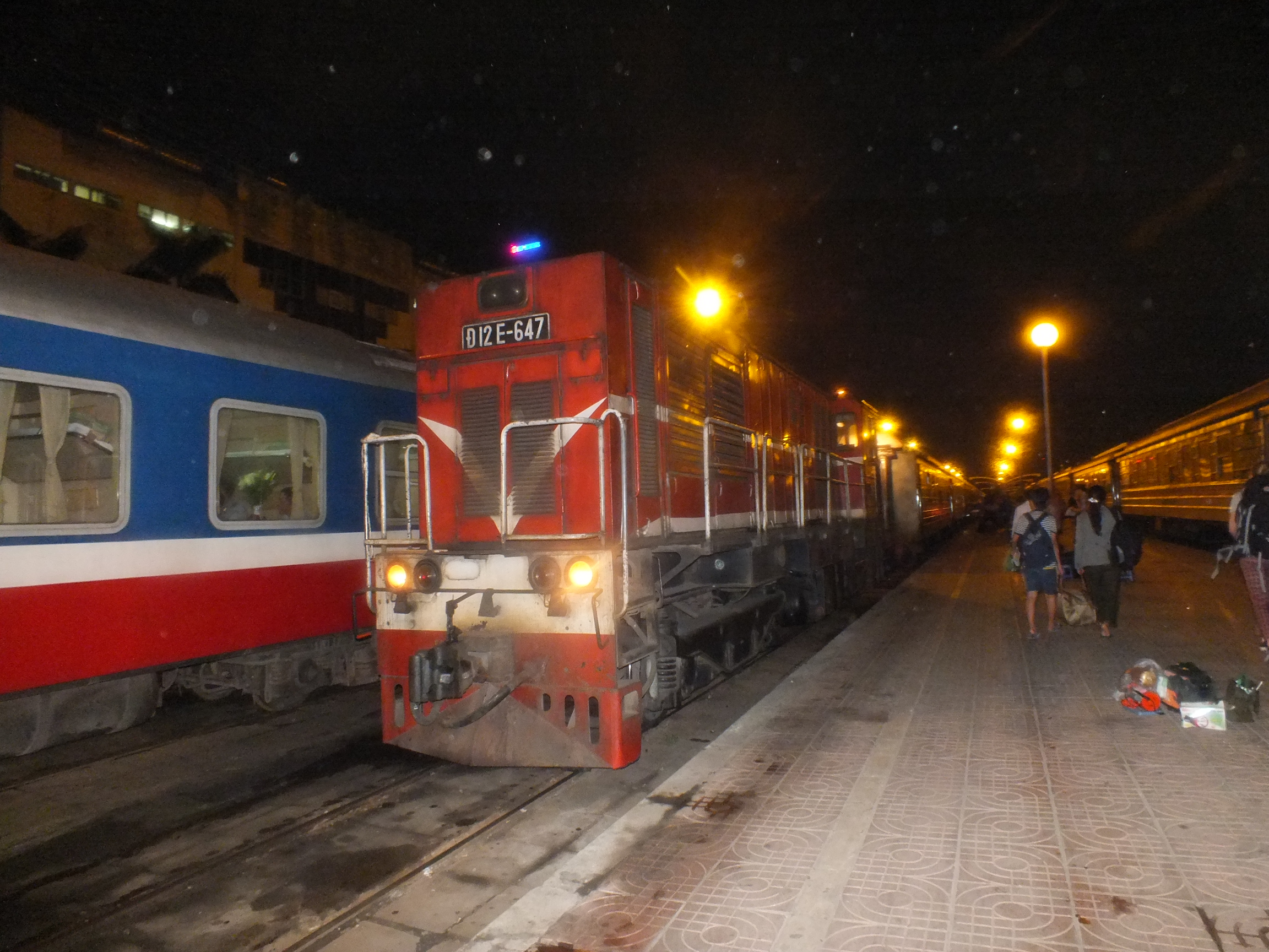 2013-07-15 Ga Ha Noi(Hanoi Station)ハノイ駅 D12E-647